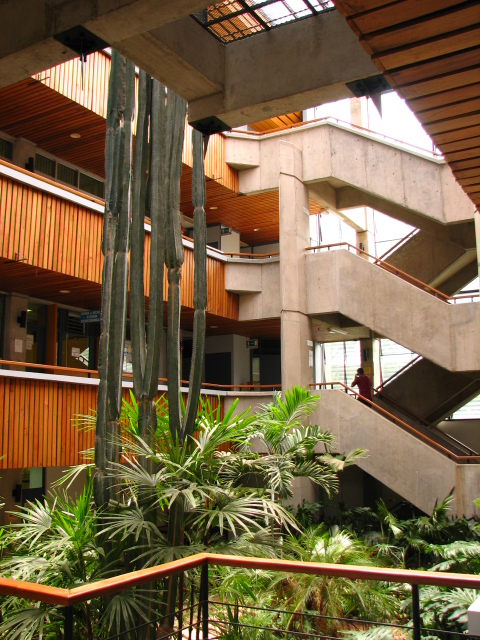 Edificio de Registro de la Universidad de Costa Rica